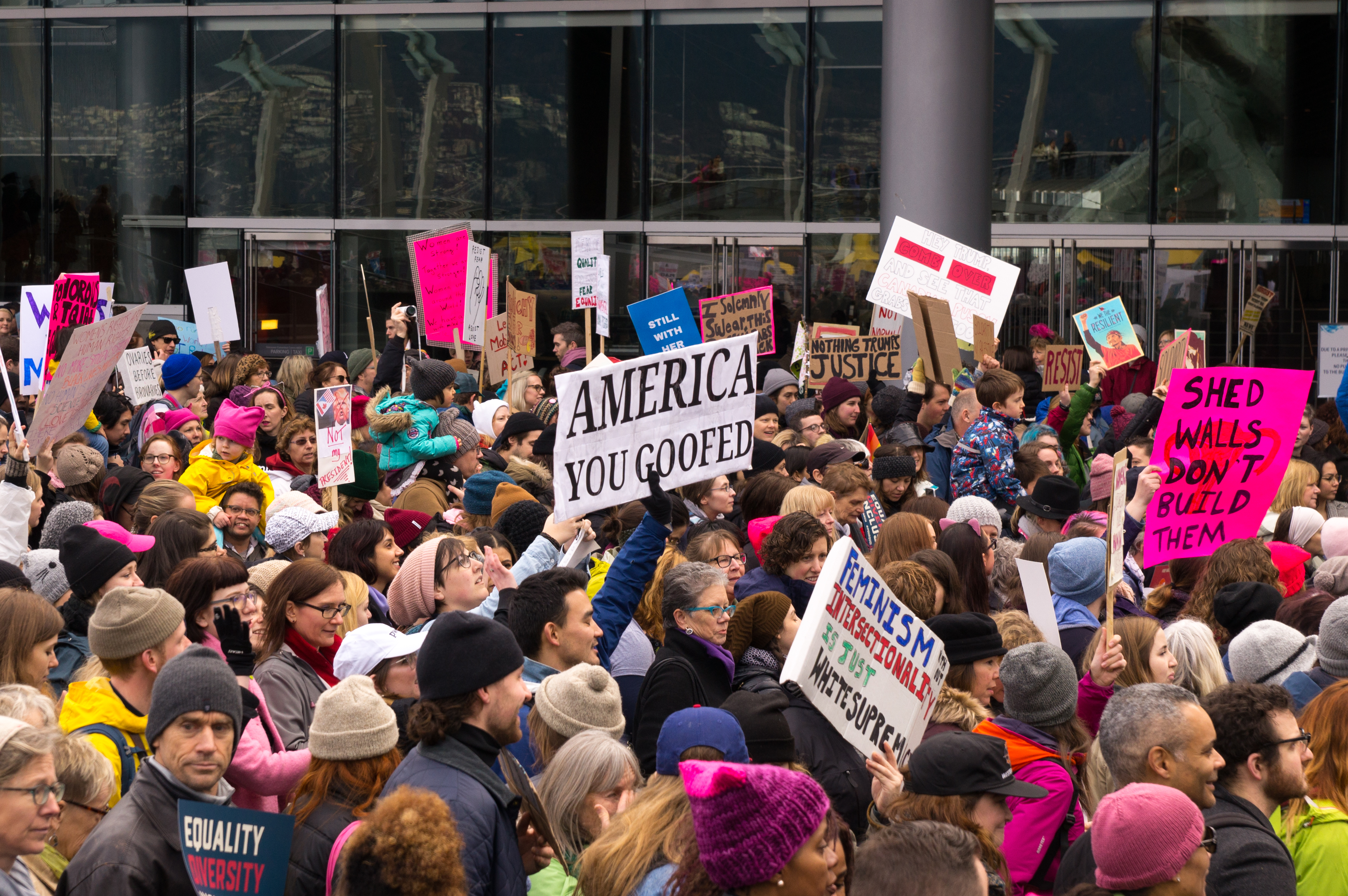 Ya goof!